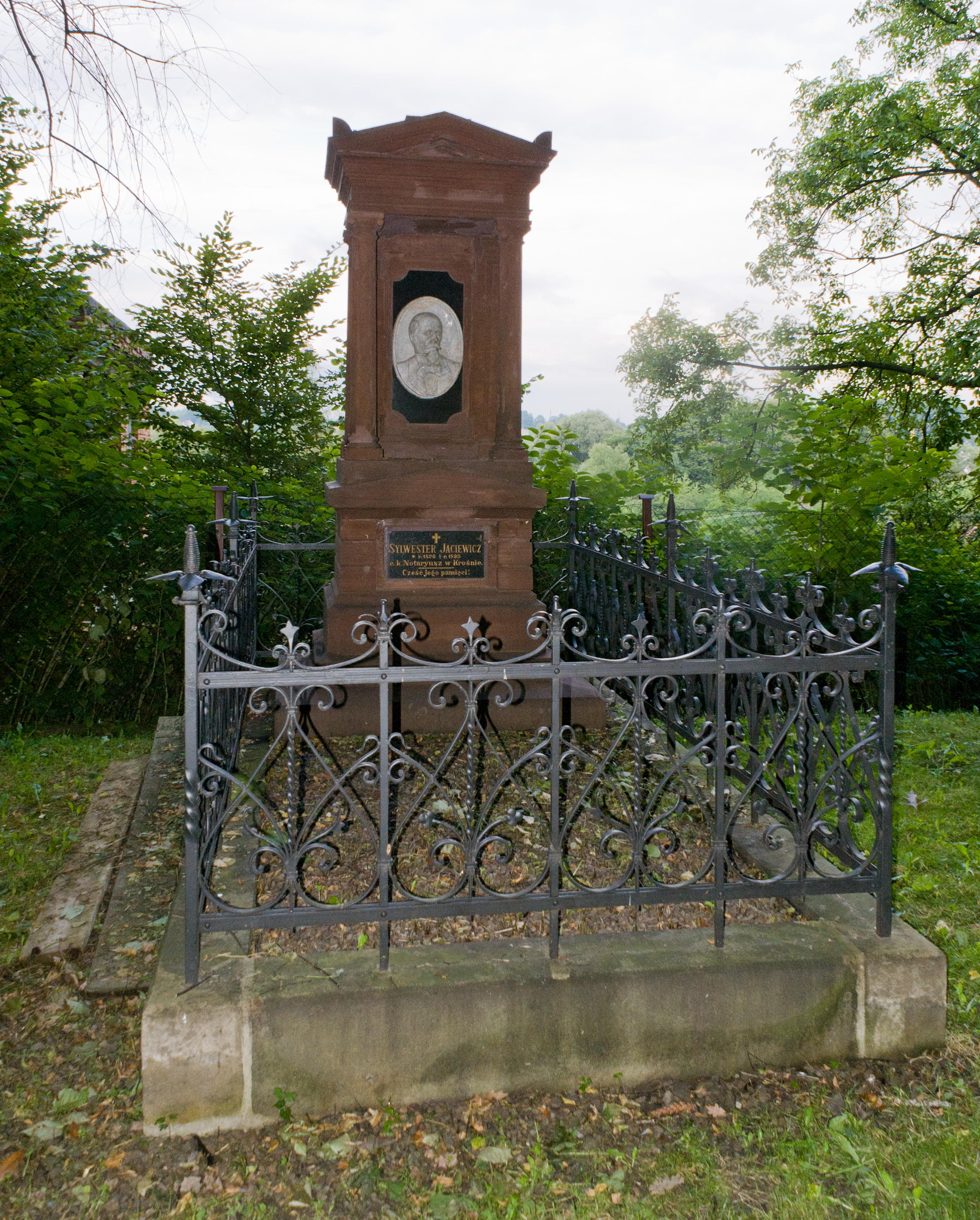 Grobowiec burmistrza Sylwestra Jaciewicza z 1895 r., autorstwa rzeźbiarza Józefa Sroczyńskiego z Dębowca, kuty w czerwonym piaskowcu trembowlańskim. Stary Cmentarz w Krośnie